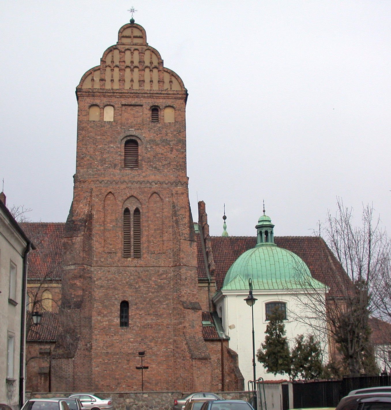 Varsavia, chiesa della Visitazione di Santa Maria (Kósciół H Nawiedzenia NMP), fianco destro sulla via Piesza